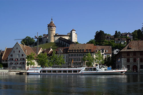 Schaffhausen: Rhein, Schifflände, Munot (Nr. 03.1-5260)